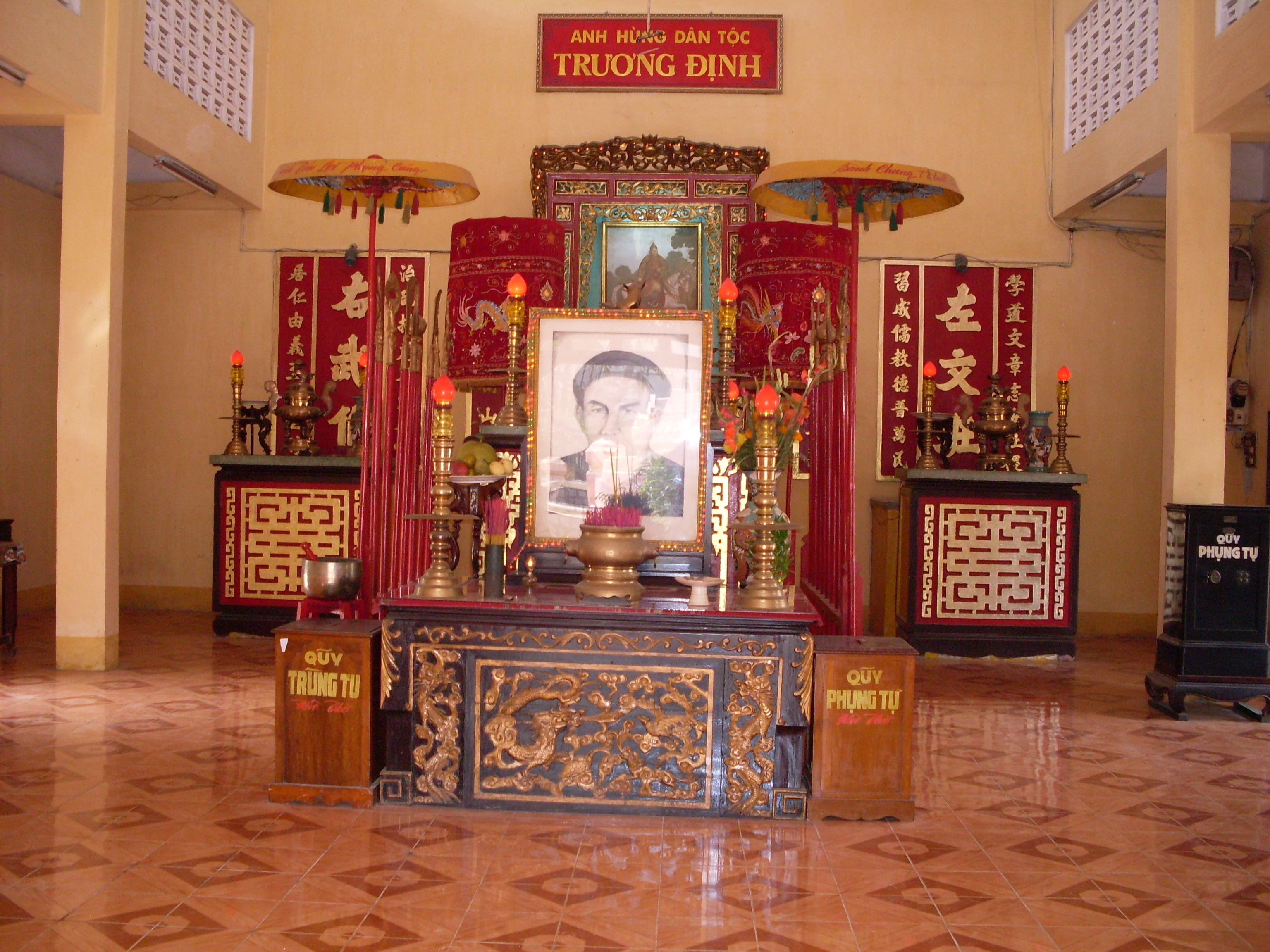 Bên trong đền thờ Trương Định ở thị xã Gò Công (Tiền Giang, Việt Nam).